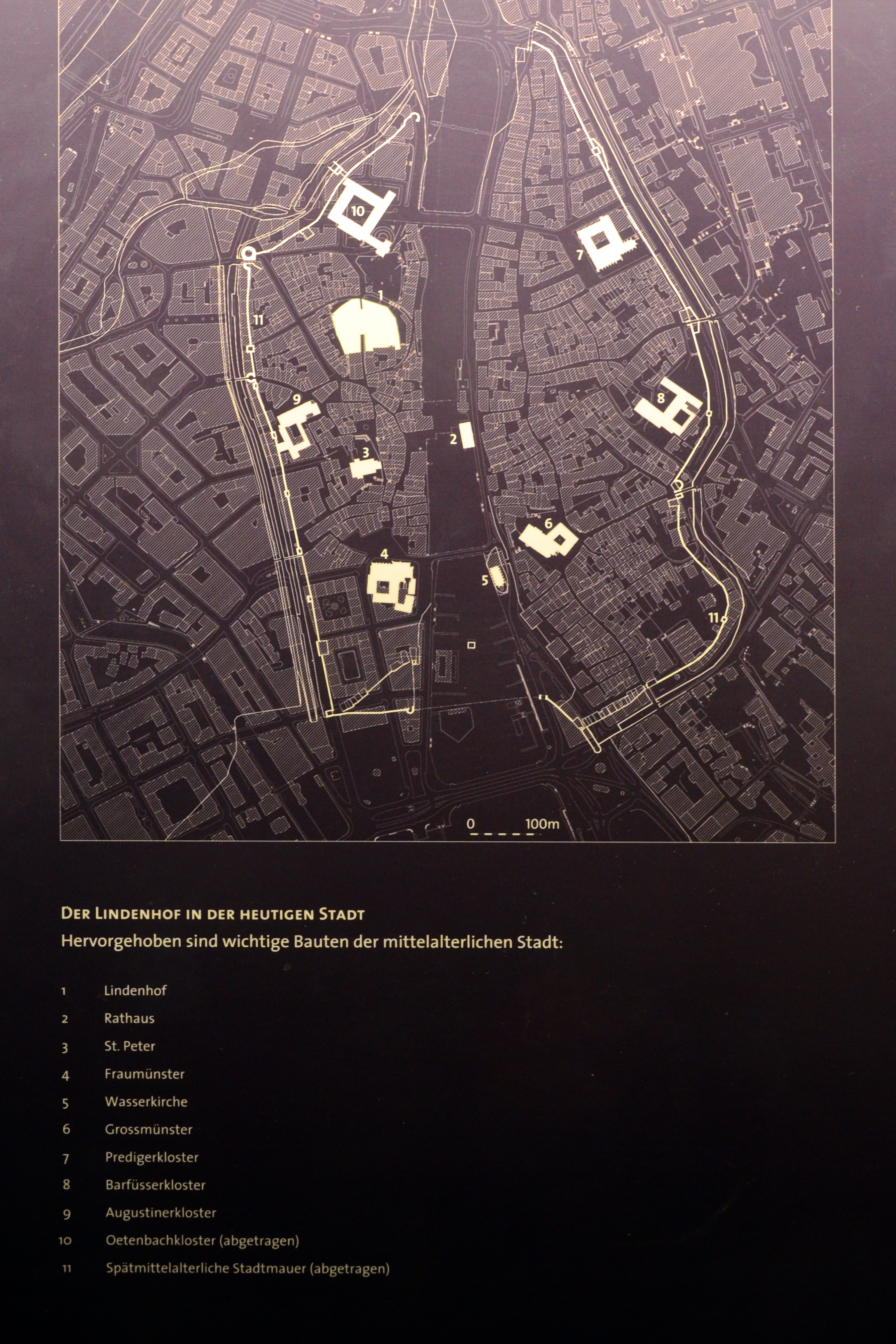 Lindenhof-Keller, Turicum (Zürich)